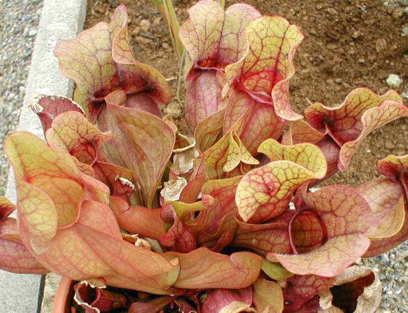 S. purpurea ssp venosa (C) Martin Brunner (